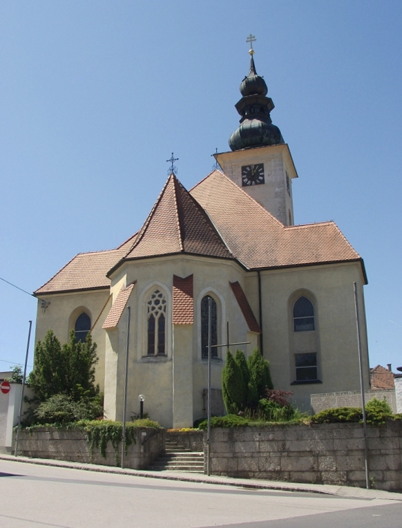 Church in Hörsching